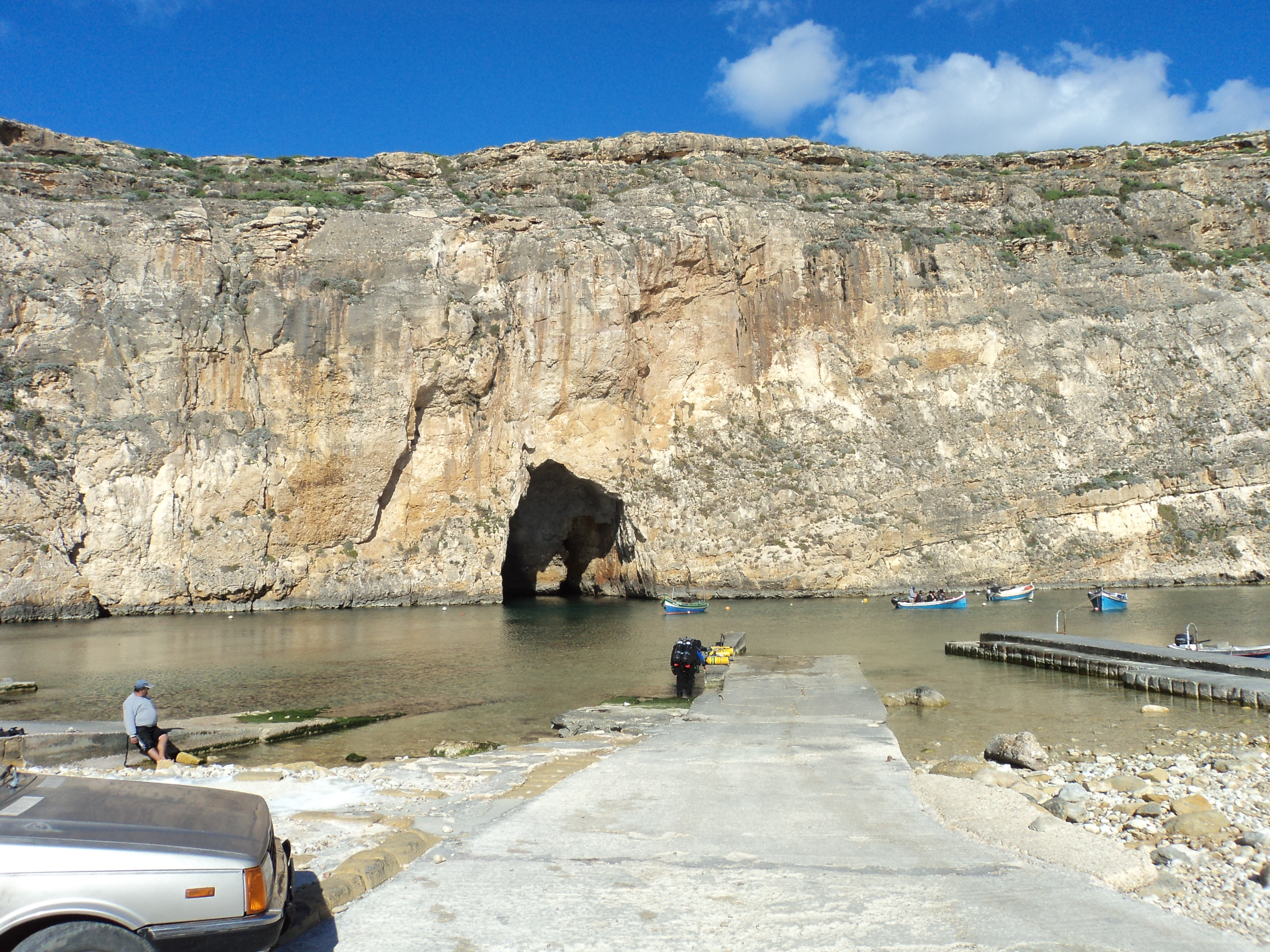 Vue de Inland Sea à Gozo